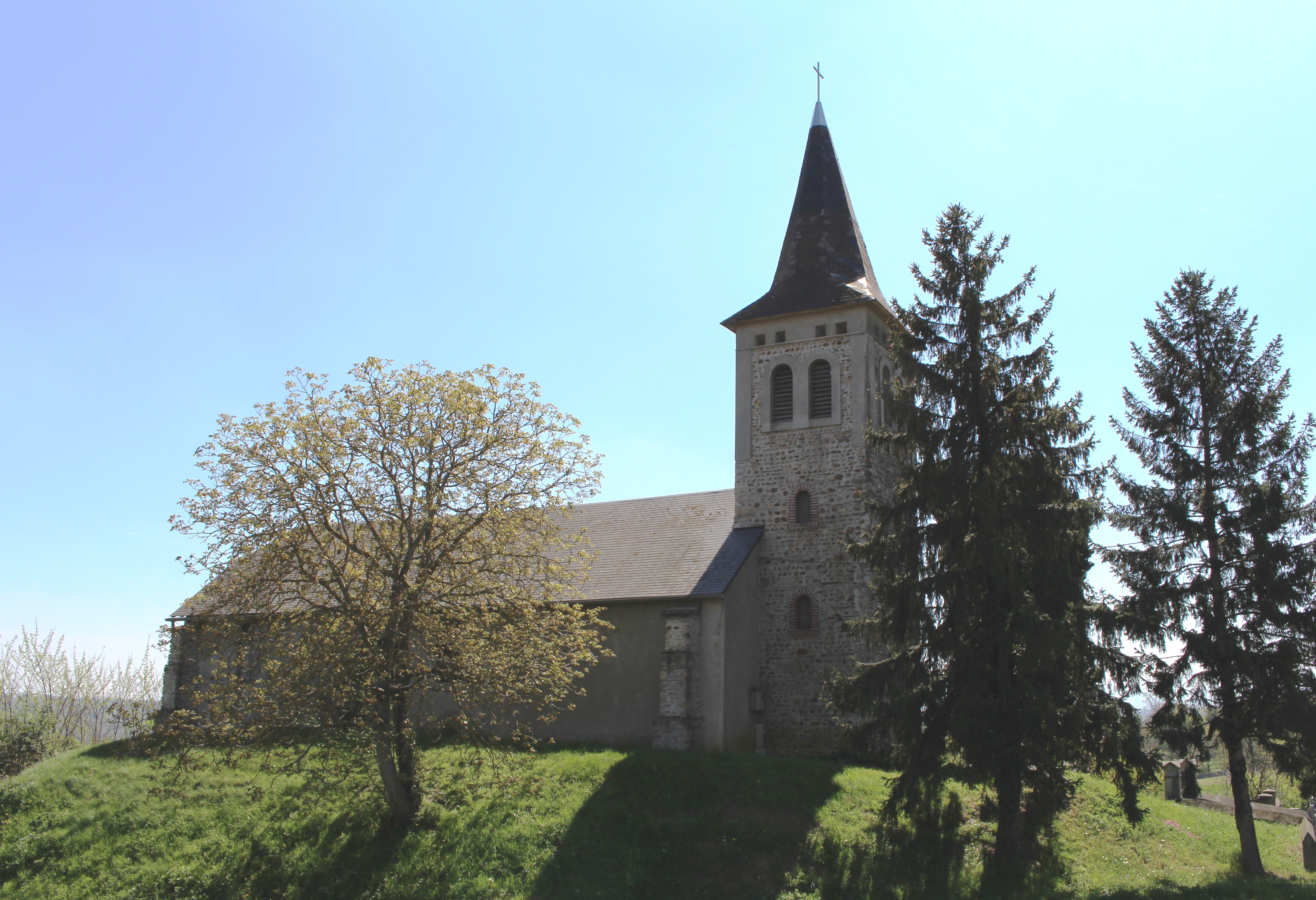 Église Saint-Jean-Baptiste de Lespouey (Hautes-Pyrénées)